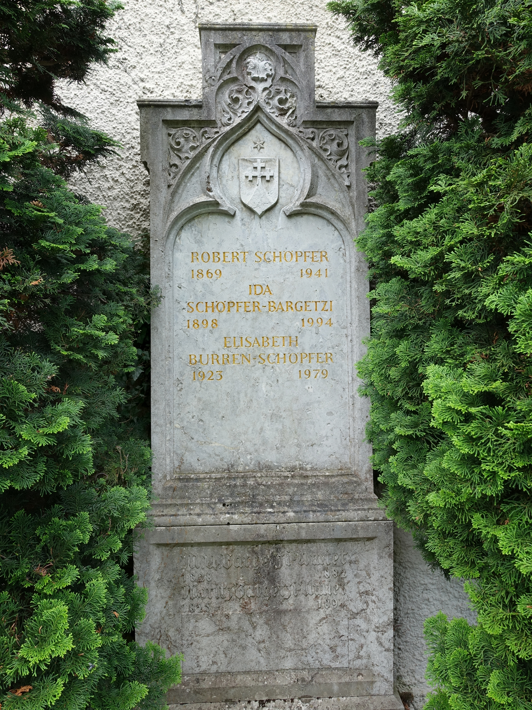 Robert Schöpfer (1869–1941) Politiker. Familien Grab Schöpfer-Bargetzi, Burren-Bargetzi, Moritz Bargetzi-Amiet (1825–1894), Maria Anna Bargetzi- Amiet (1828–1882) bei der Kirche St. Niklaus, Feldbrunnen-St. Niklaus, Schweiz.